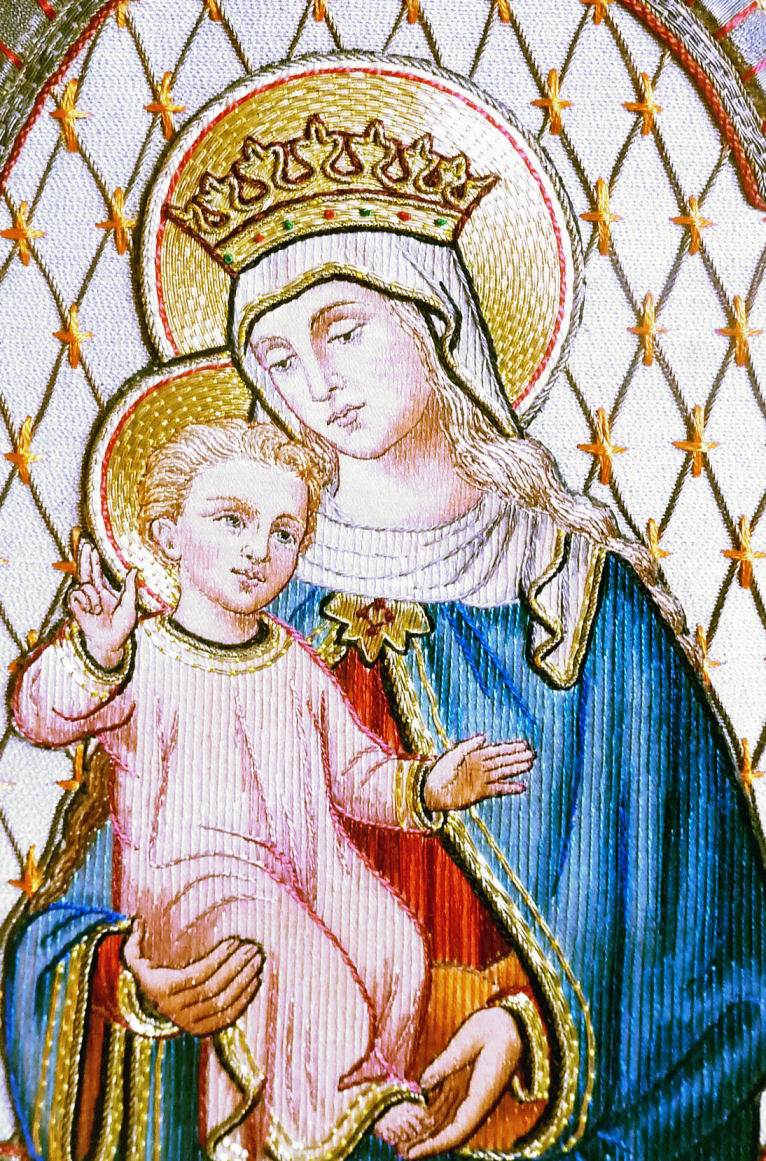 Kerk van Elversele, Temse. Koorkap Henri Van Severen-De Winter Ca 1900